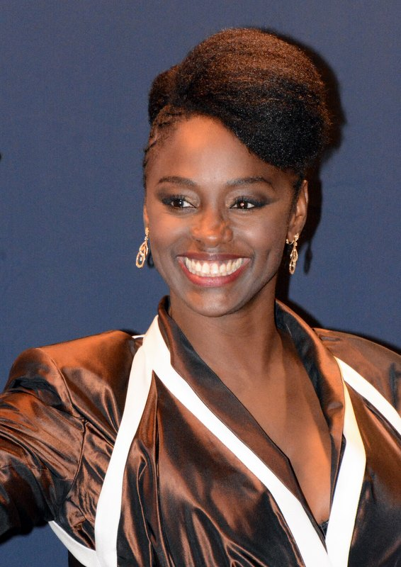 Aïssa Maïga à la cérémonie des César